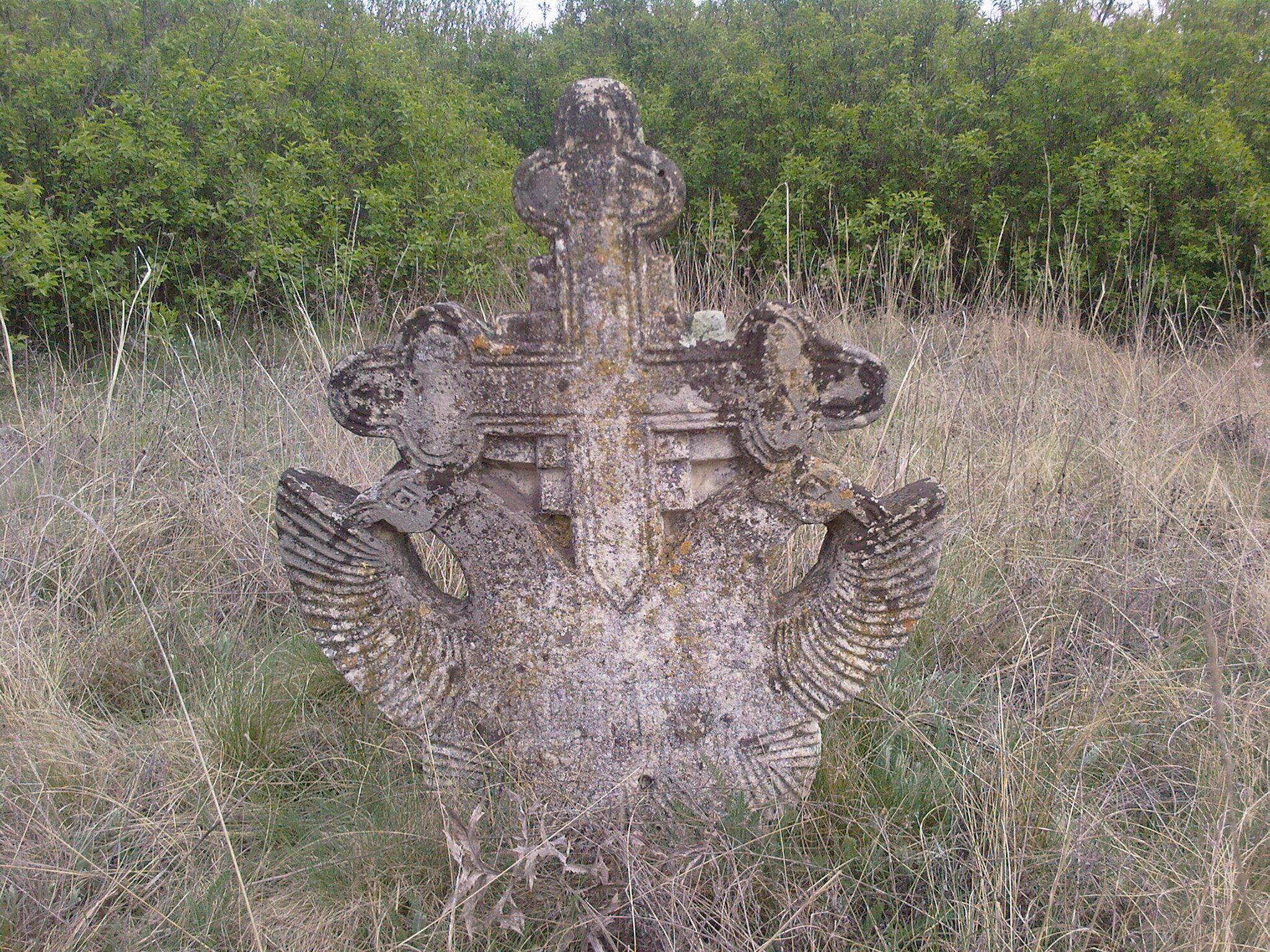 старий цвинтар біля с. Семенівка Єланецького району Миколаївської області